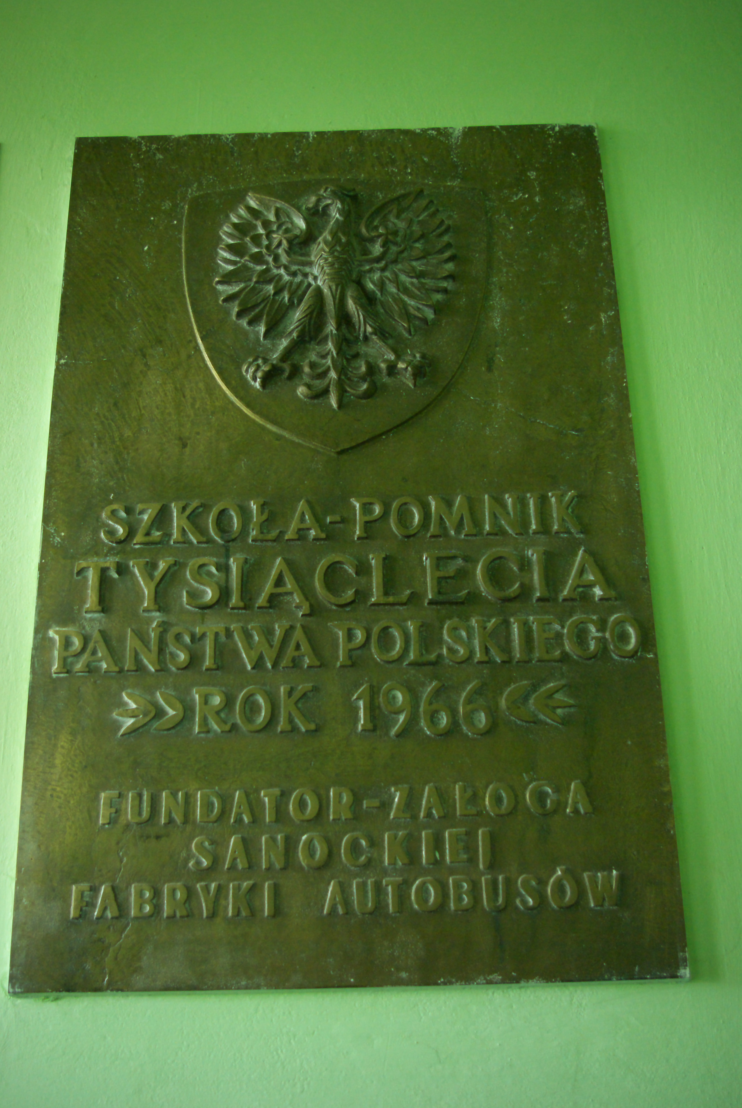 Tablica pamiątkowa upamiętniająca budowę szkoły w 1966 roku